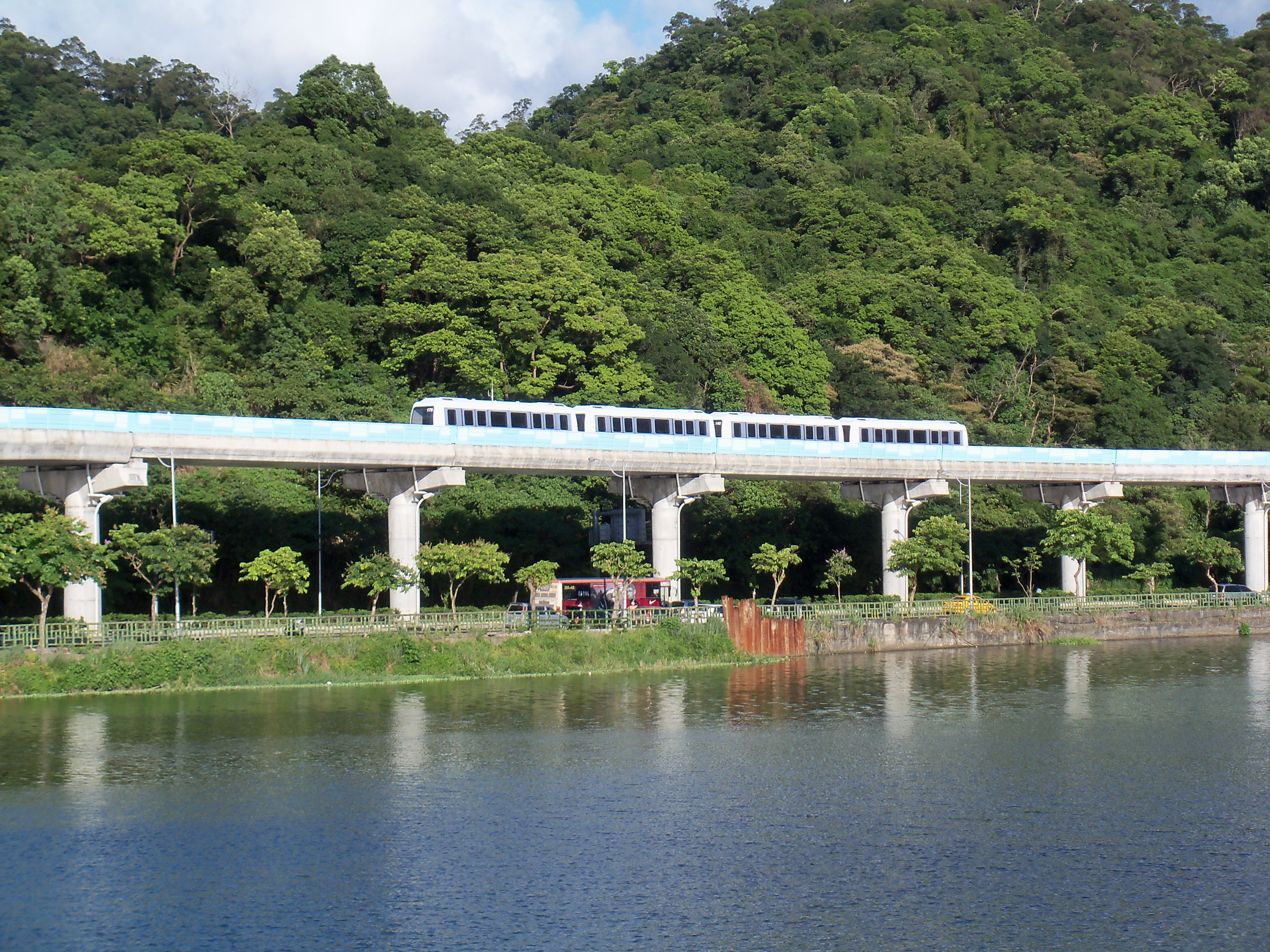 臺北捷運內湖線大湖公園站～葫洲站間的CITYFLO650型電聯車。